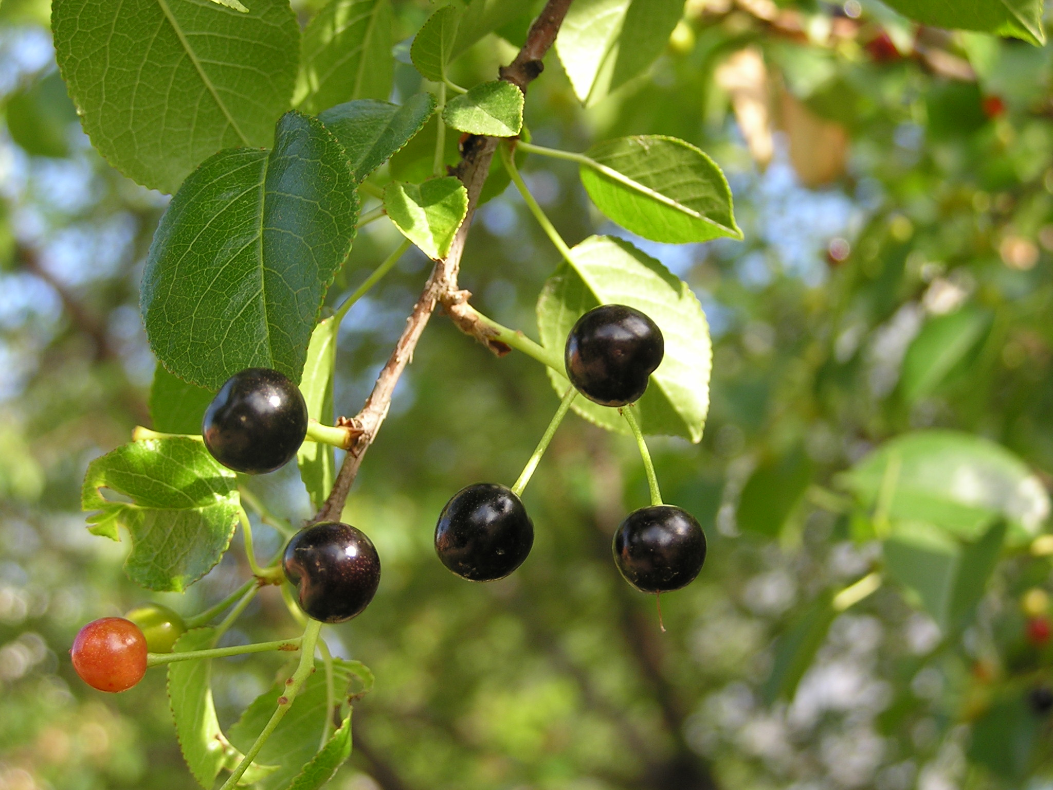 Растение